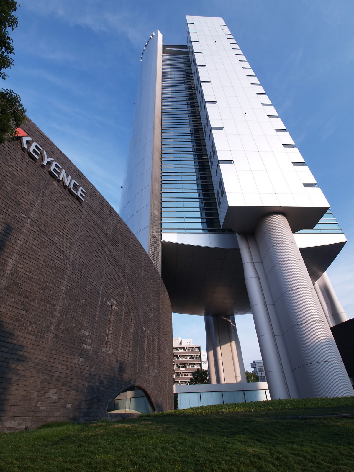 株式会社キーエンス 本社 所在地：大阪府大阪市東淀川区東中島1-3-14